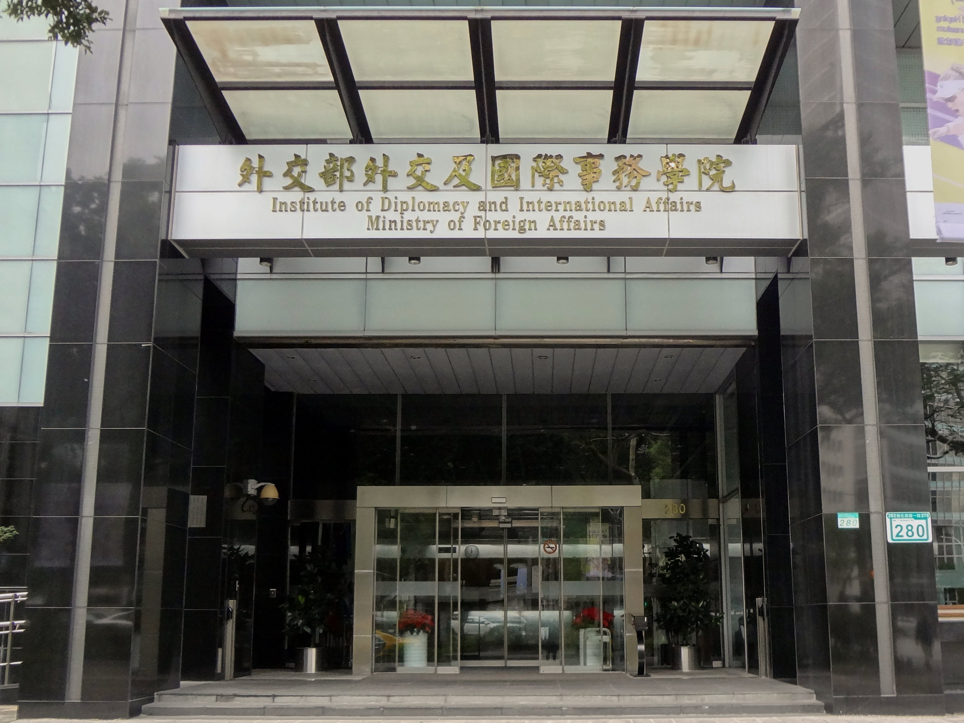 中華民國外交部外交及國際事務學院大樓大門。